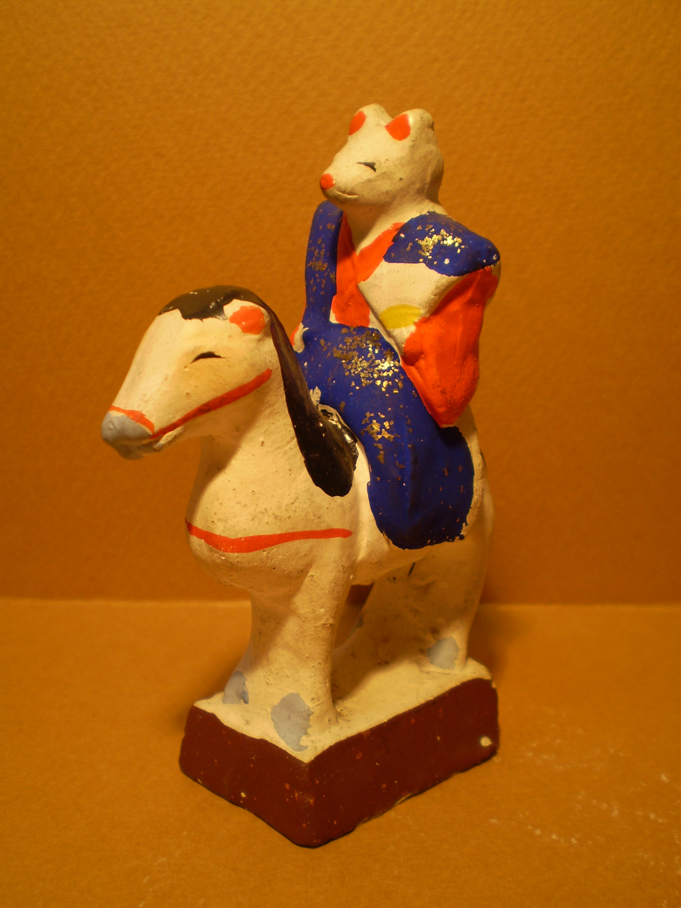 今戸人形「狐馬」尾張屋 金沢春吉作 （昭和初期） 今戸焼